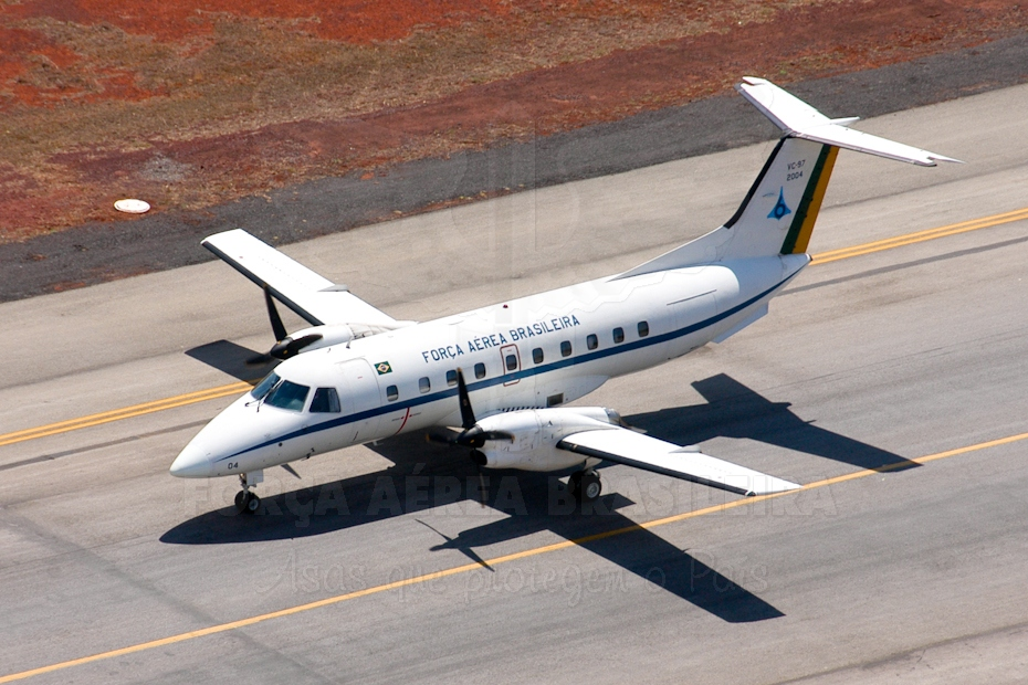 C-97